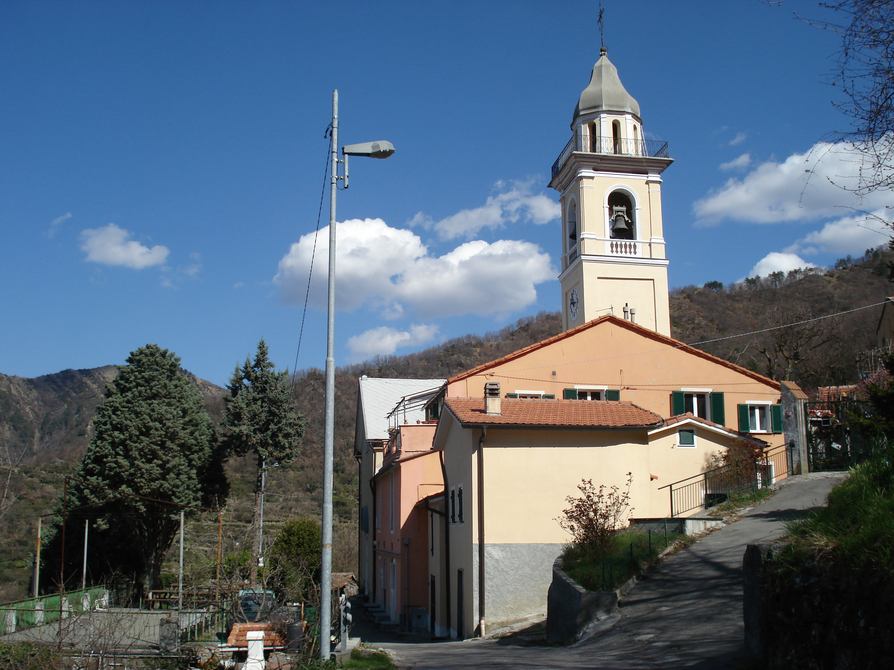 Marsiglia (Davagna),Cosmin latan